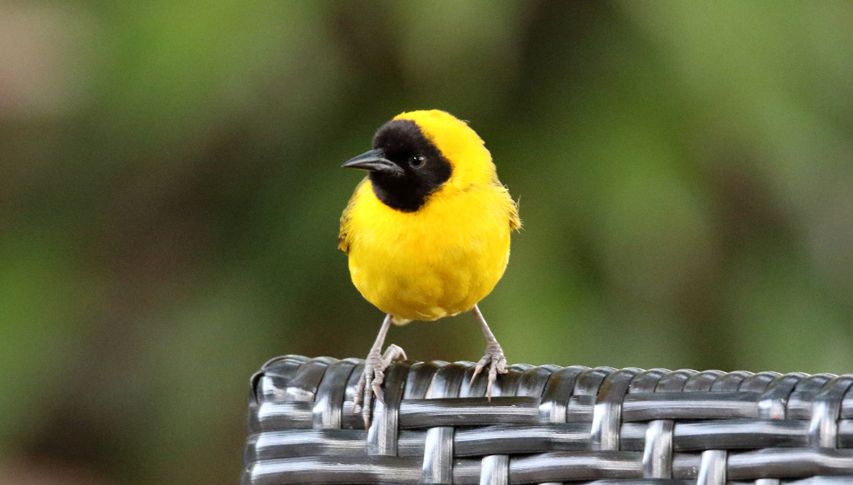 Slender-billed Weaver (Ploceus pelzelni)